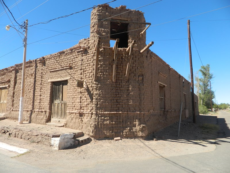 Esta casa ubicada en el Barrio el Troyano, fue construida en el siglo XIX, su propietario don Lázaro Martínez, perteneciente a una de las familias más ricas de la época. Se cuenta la anécdota en el pueblo, que llego a prestarle dinero al gobierno de la Rioja y que mandó a construir el balcón para que su esposa pudiese divisarlo cuando partía y regresaba de Chile, donde realizaba la venta de ganado vacuno, además utilizaba el balcón para mirar y controlar a los peones que trabajaban en la finca con sembradíos de alfalfa y trigo.